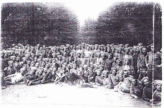 В центре командир полка В.К. Нейзель.